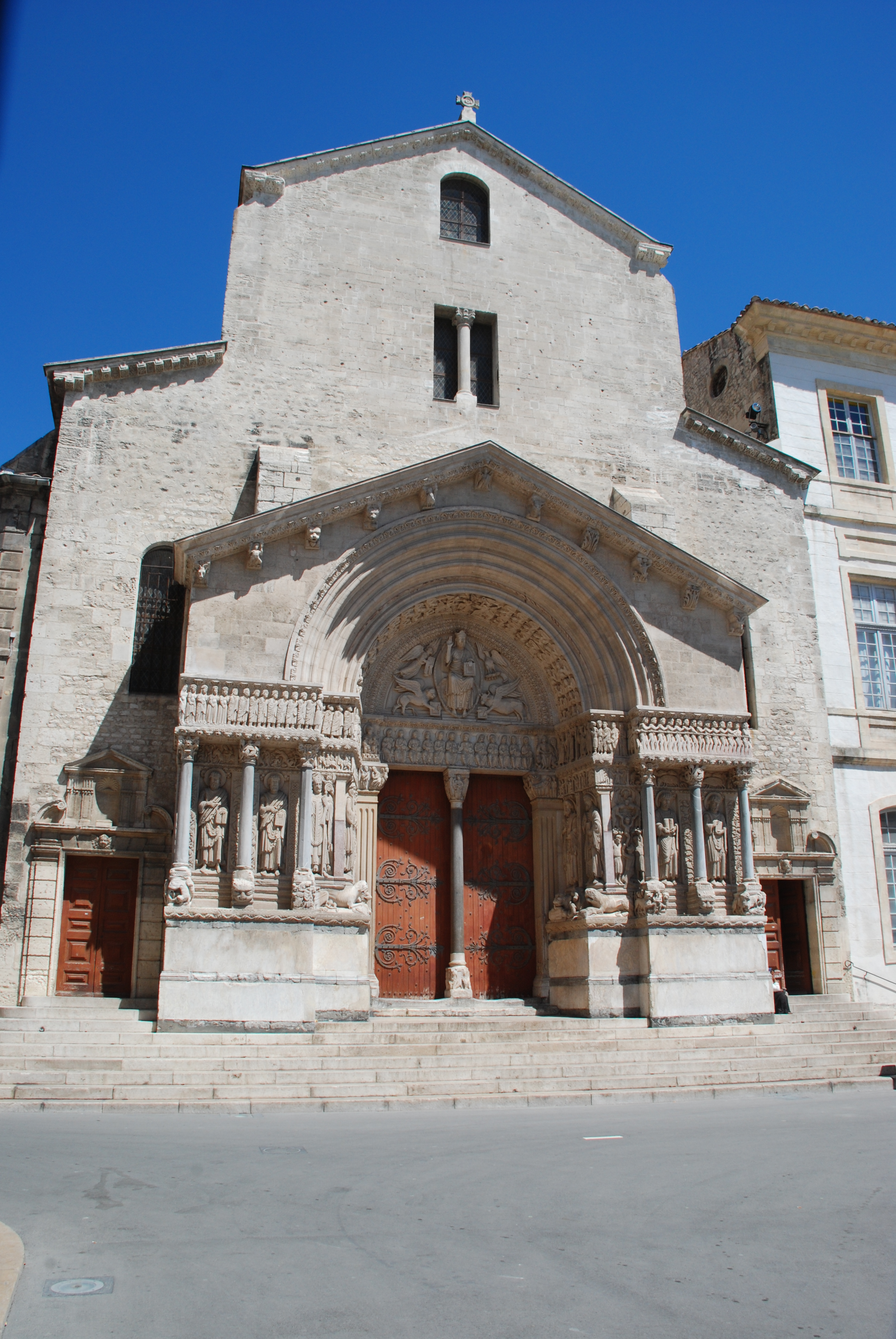 France - Arles - Saint-Trophime